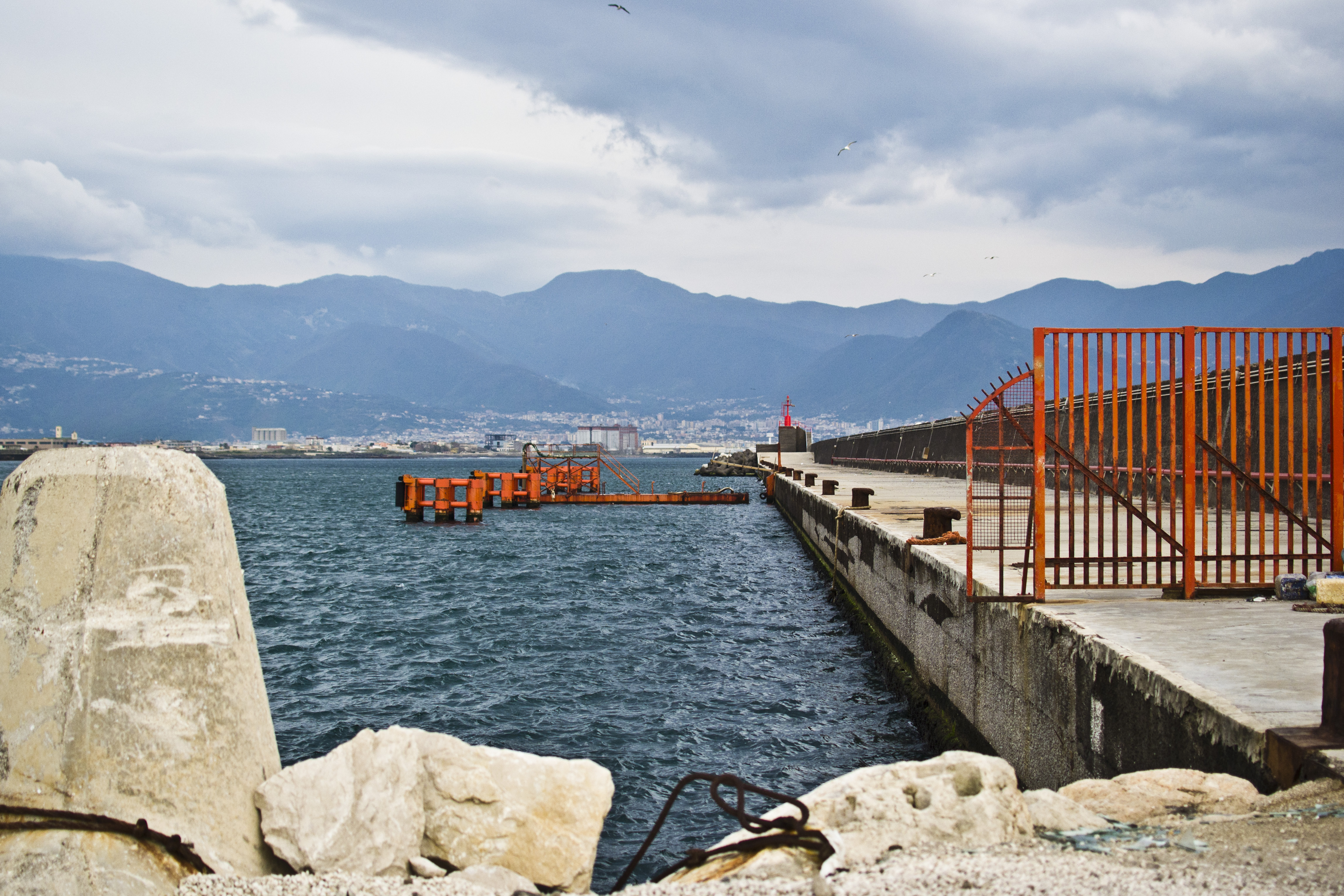 Porto di Torre Annunziata